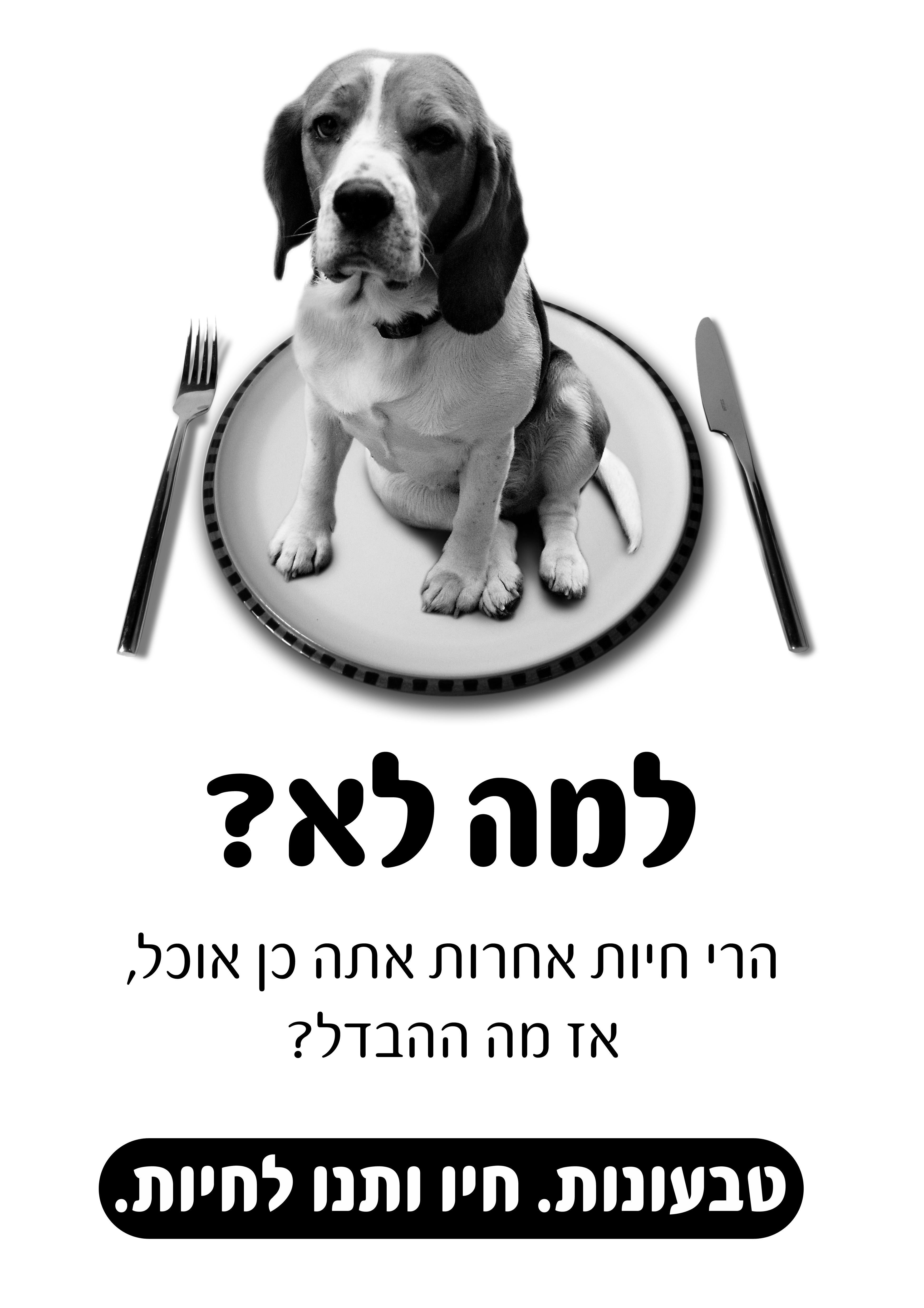 פוסטר מה ההבדל- טבעונות